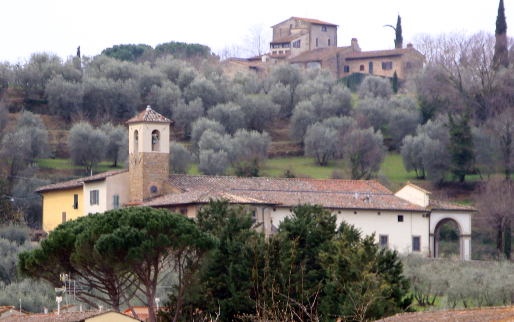 Santa Maria e Santa Brigida al Paradiso